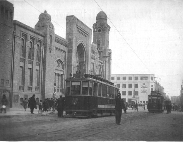 Трамвай перед Сабунчинским вокзалом на проспекте Ленина (ныне Азадлыг)